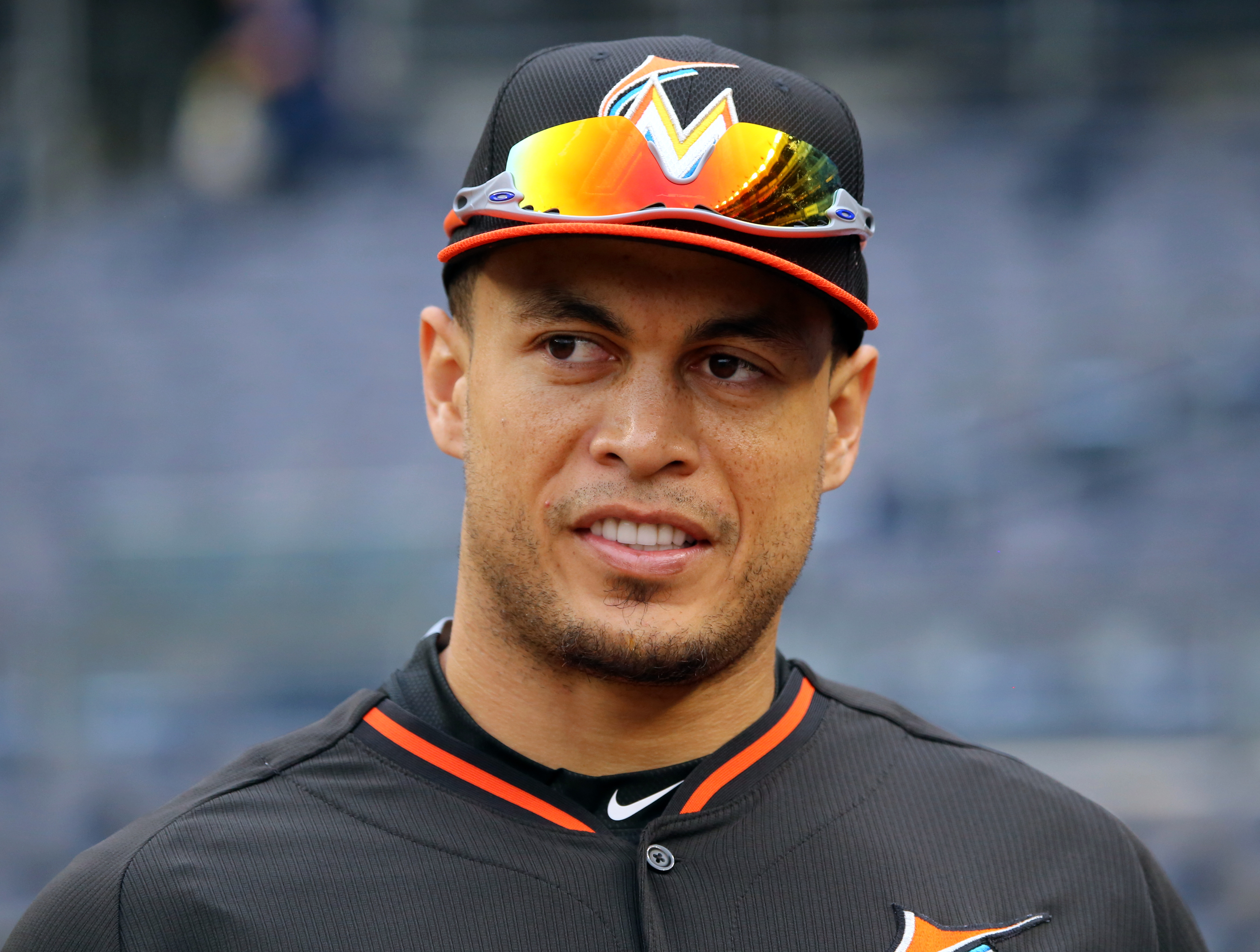 Giancarlo Stanton